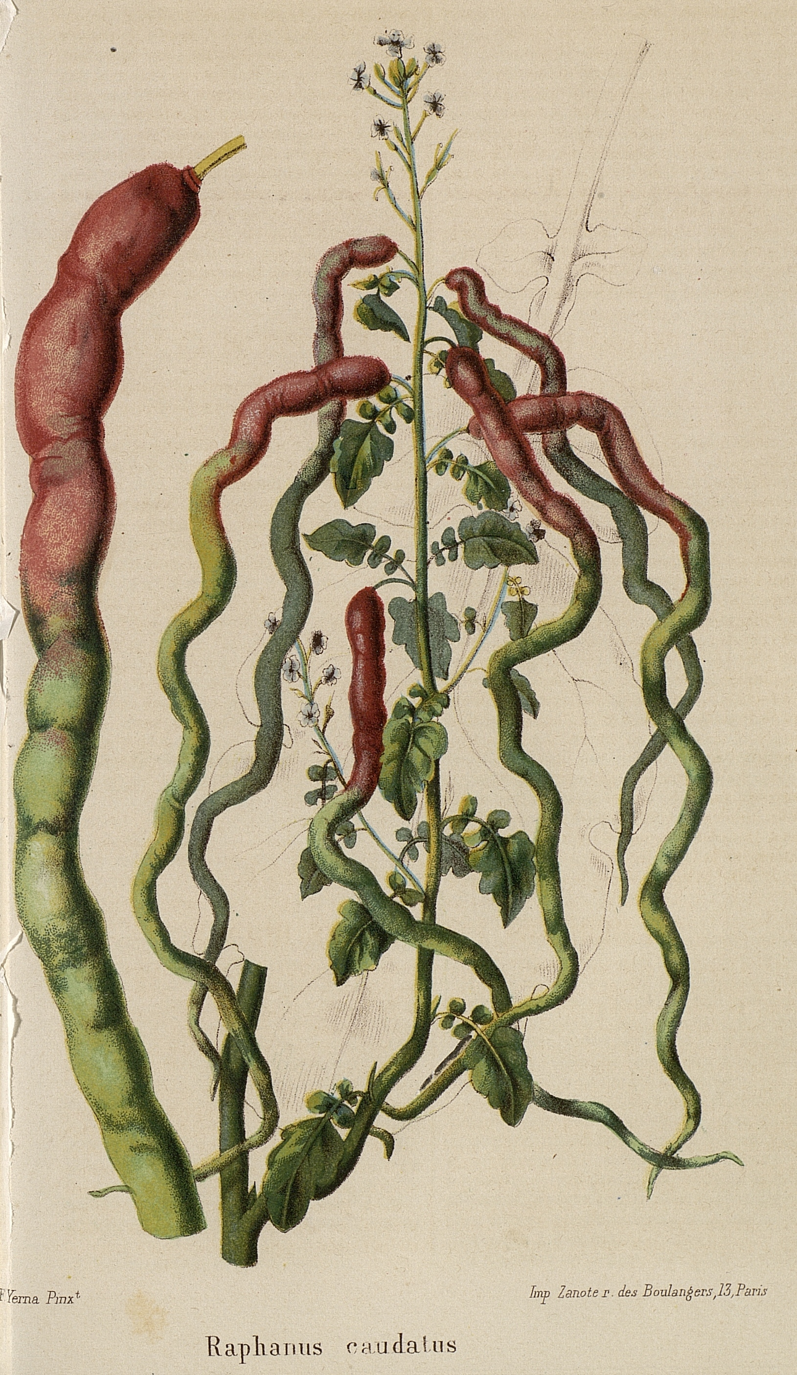 Raphanus caudatus ou radis serpent gravure extraite de la Revue horticole 1866